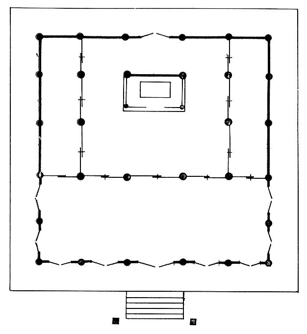 Layout of Myôô-in